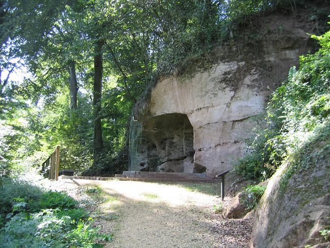 Herapel (Cocheren)